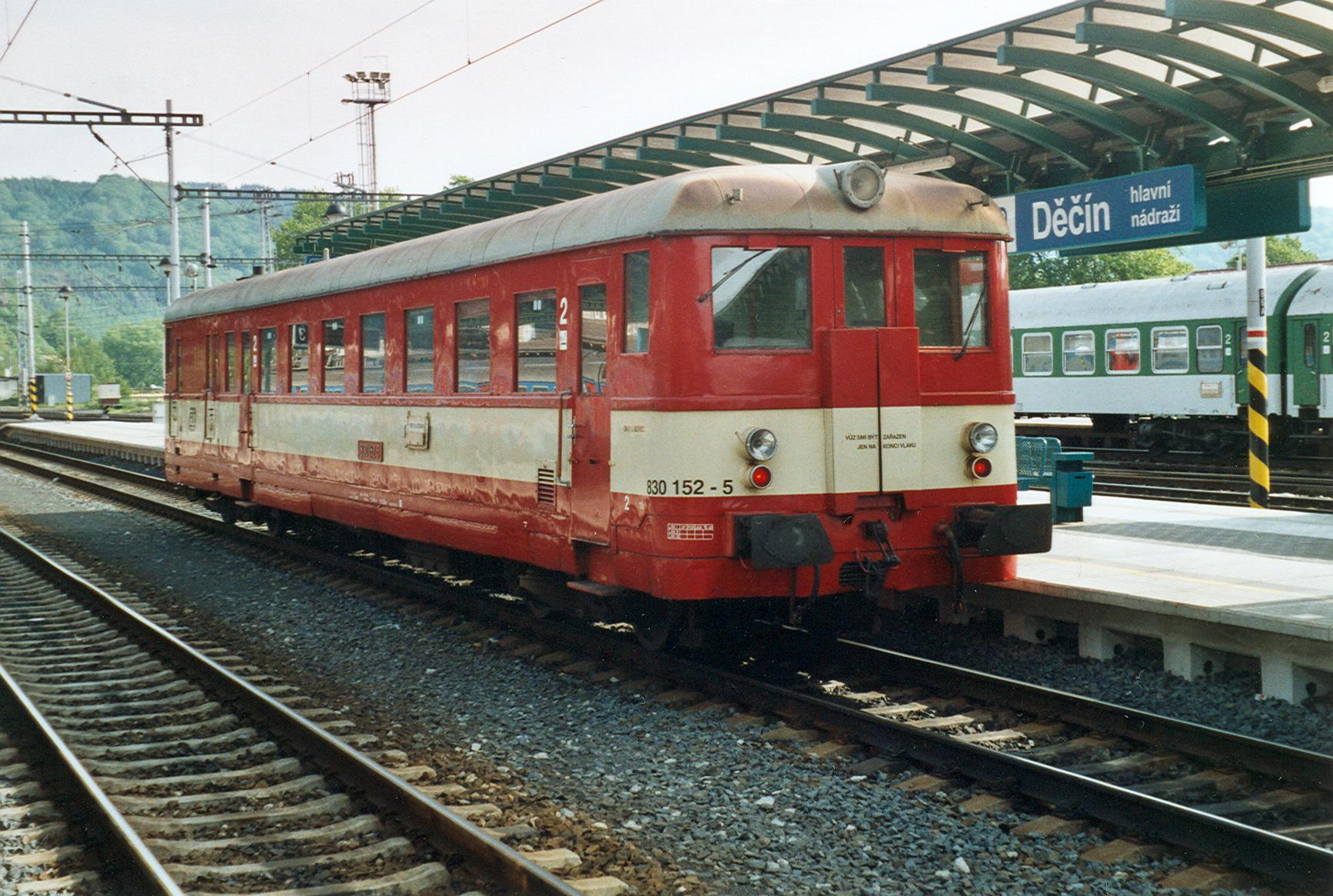 Triebwagen der Reihe 830, letzter Betriebszustand, fotografiert 2004 in Decin h.l.n.